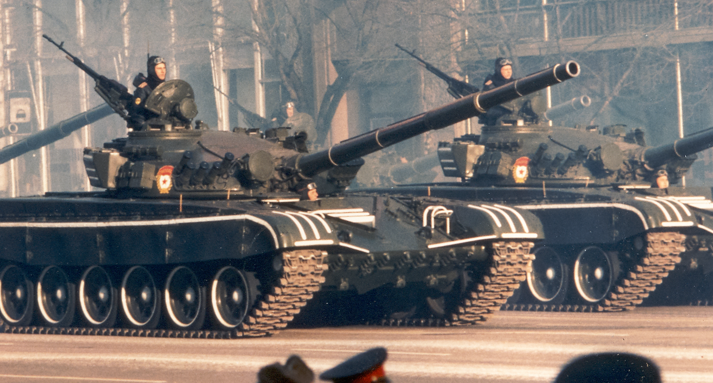 Carri armati sovietici T-72 (ritaglio su immagine in Pubblico dominio)